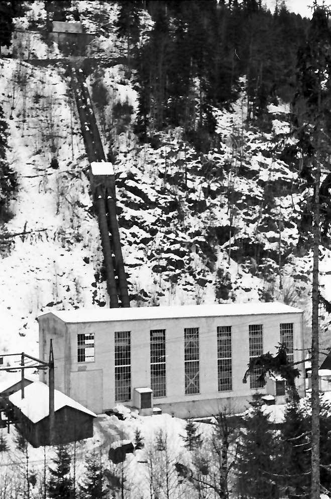 Maschinenhaus, Druckrohrleitungen und Schieberhaus des ehemaligen Kraftwerks Eichholz im Schwarzatal